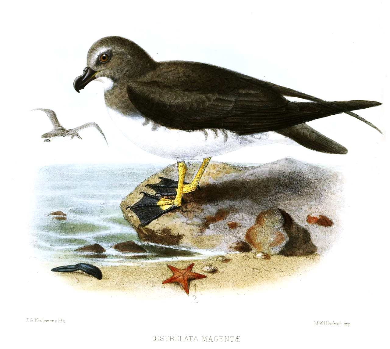 Oestrelata magentae = Pterodroma magentae